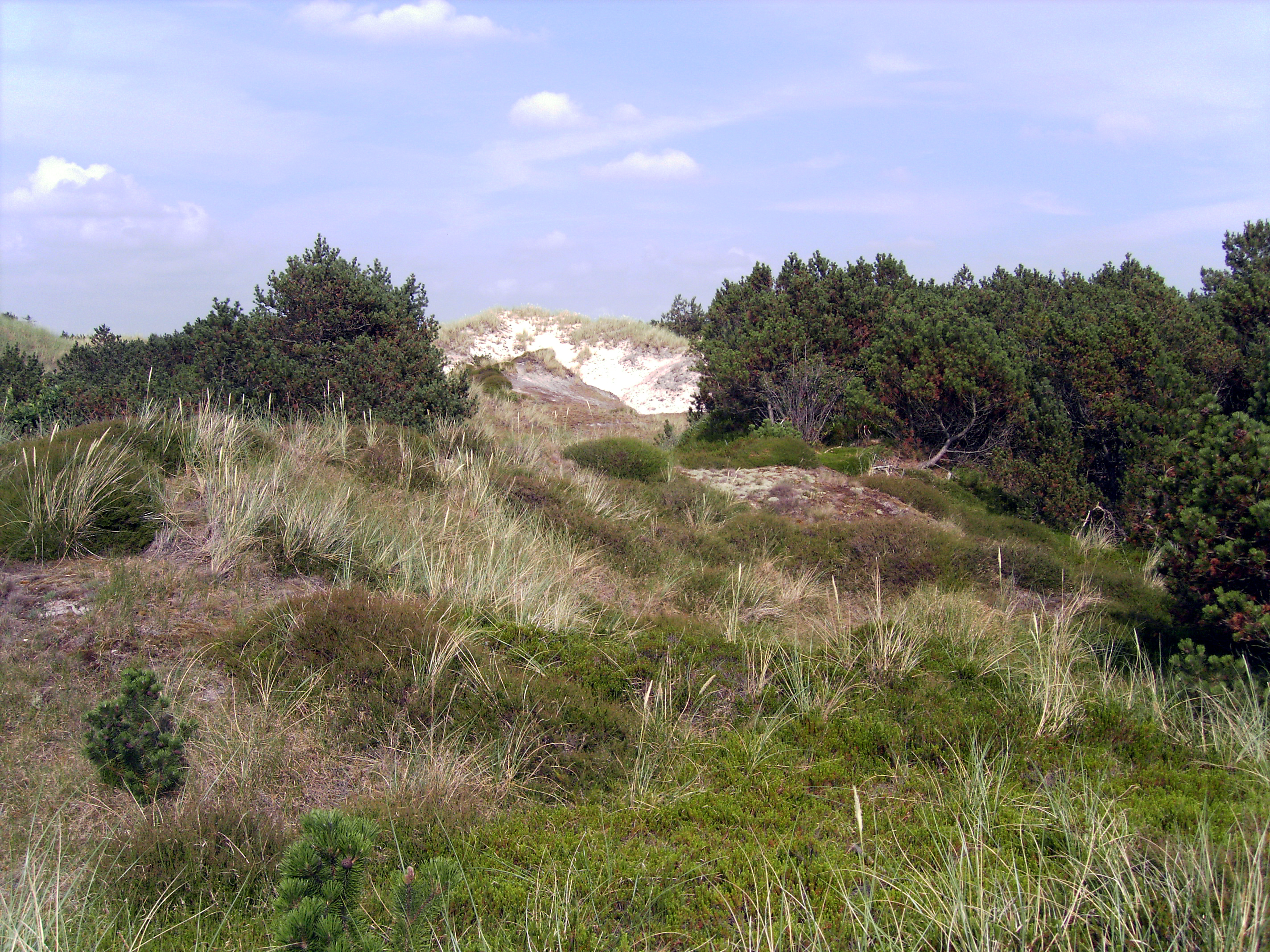 Küstendünen bei Sankt Peter-Ording (Eiderstedt, Schleswig-Holstein, Deutschland)